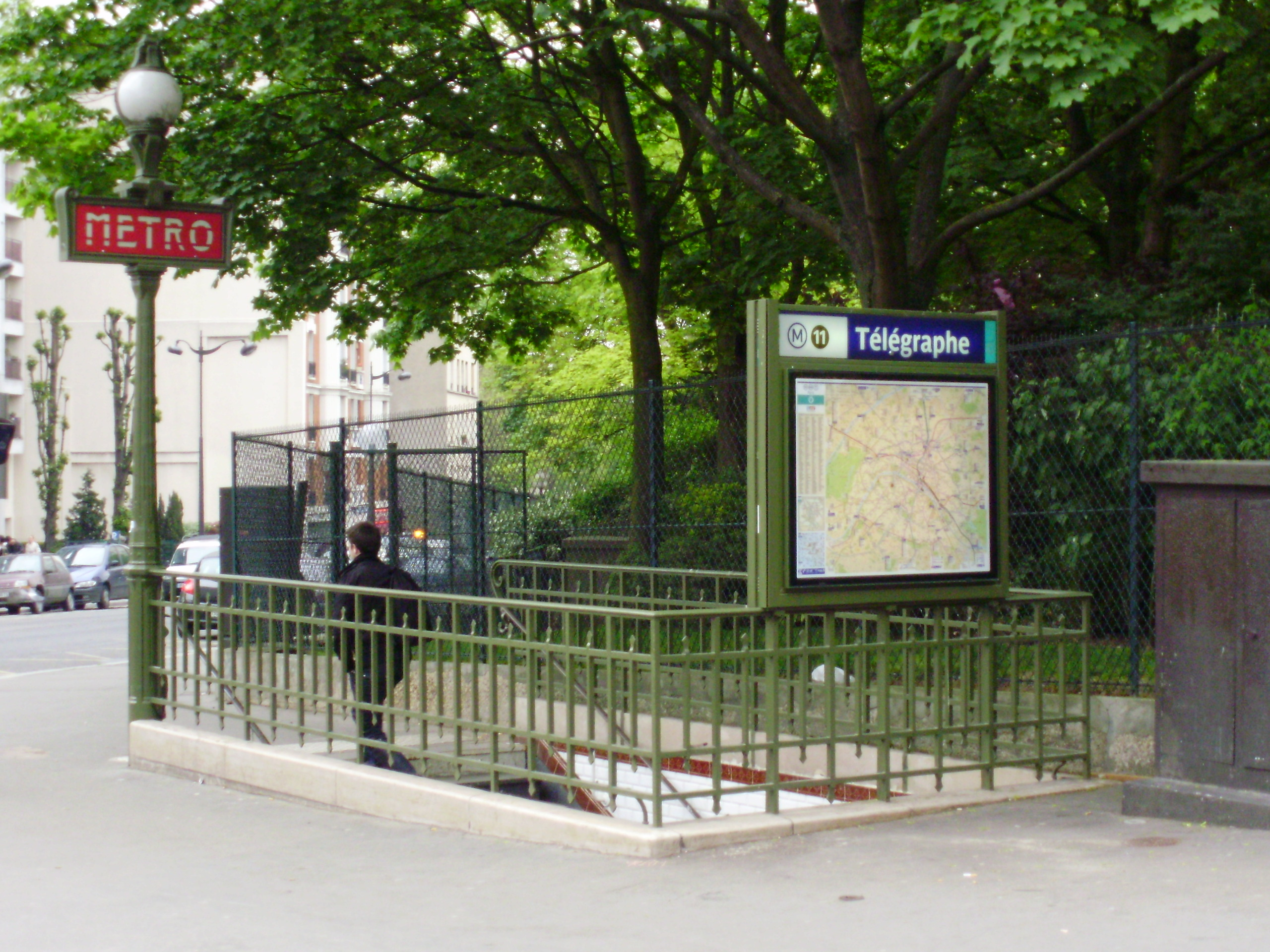 Une des entrées de la station « Télégraphe » du métro de Paris